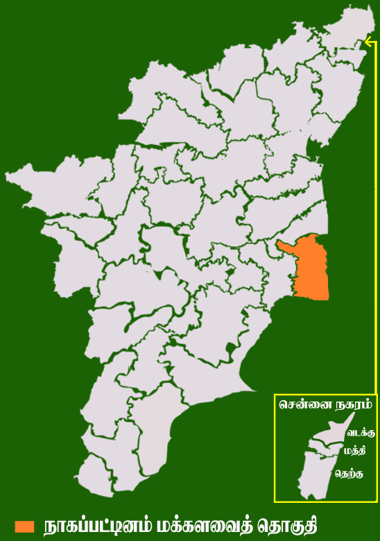 தமிழக வரைபடத்தில் உள்ள நாகப்பட்டினம் மக்களவைத் தொகுதி